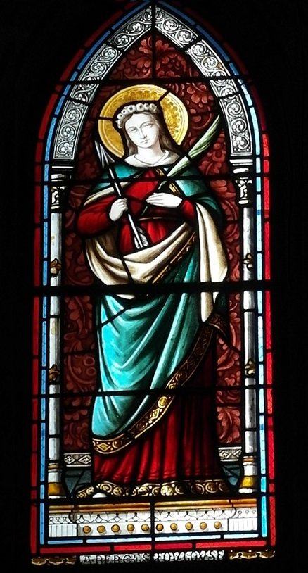 Laroque - Sainte Philomène - Vitrail de la chapelle Saint-Jean.